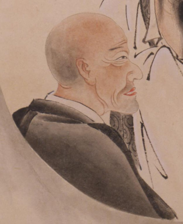 朽木昌綱の肖像。